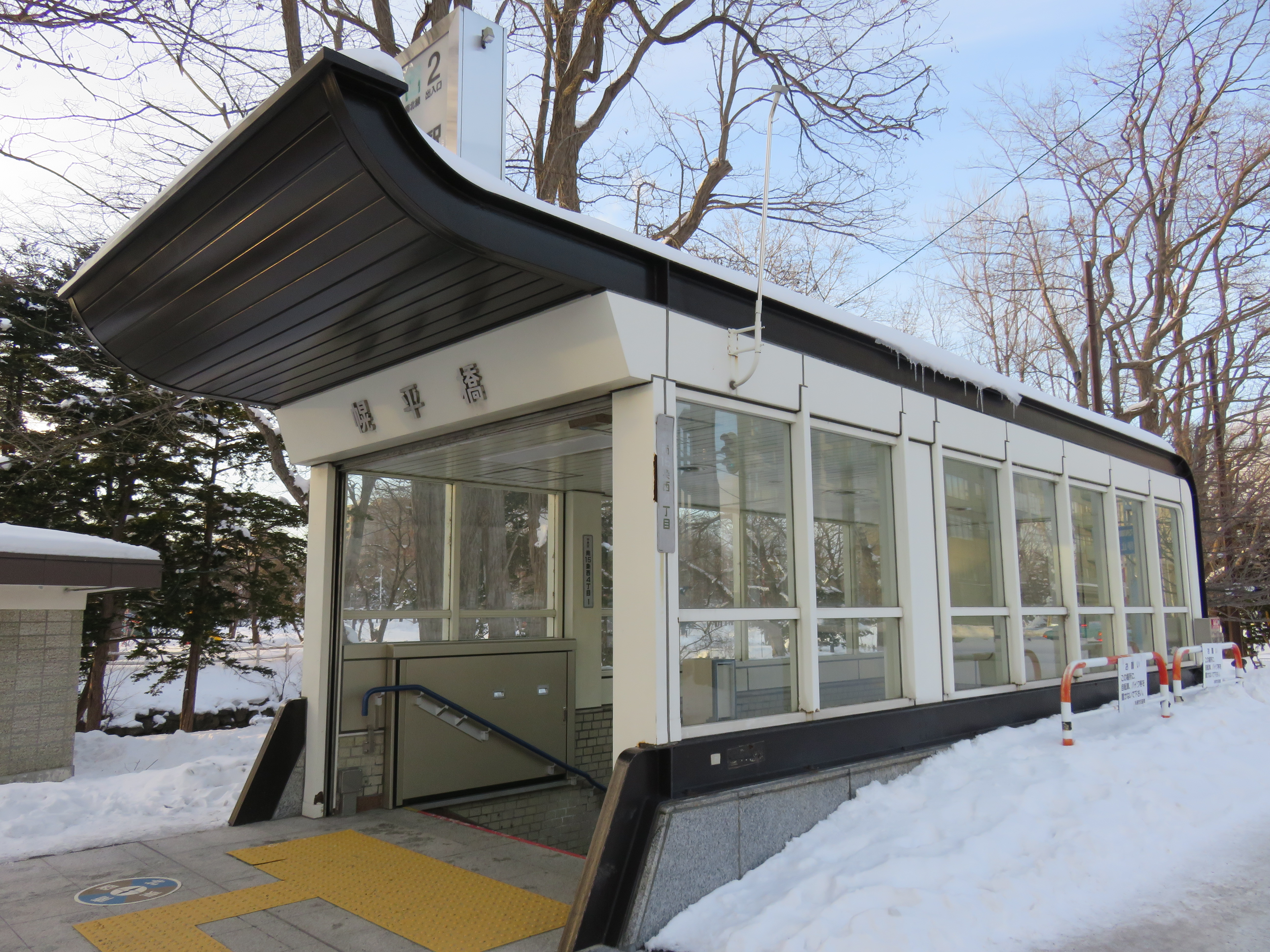 幌平橋駅2番出入口